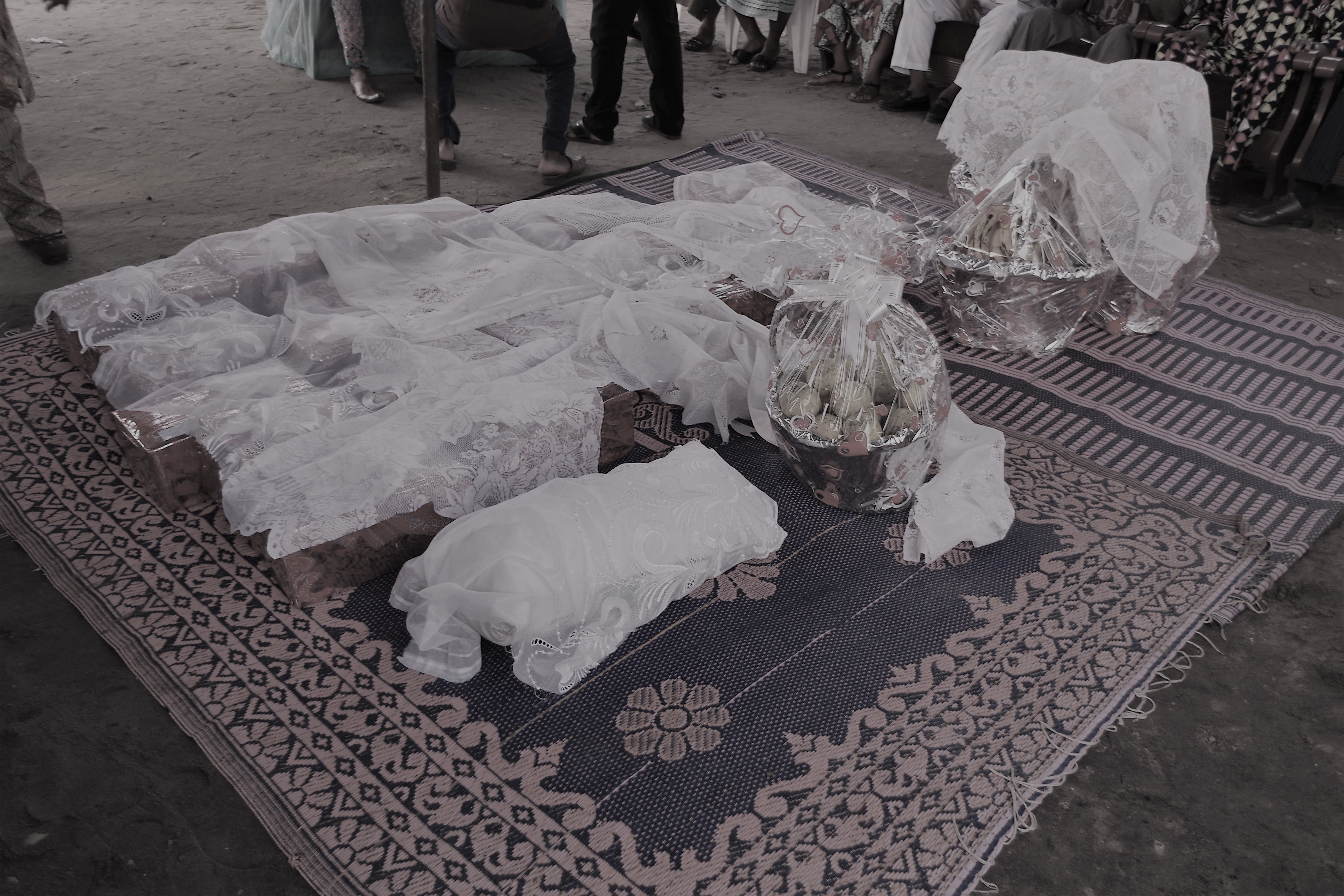 Cadeaux de dot (mariage traditionnel) au Bénin avant les cérémonies de consécration